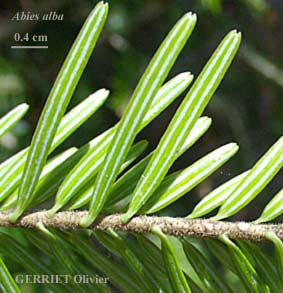 aspect des aiguilles, avec les deux lignes caractéristiques